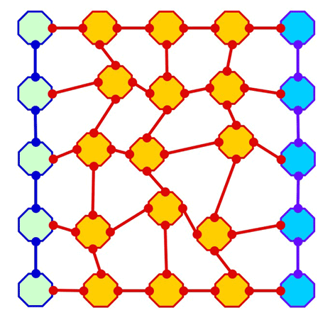 Visualisatie (artistic impression) van een lijmverbinding. September 2005 Laurens van Lieshout